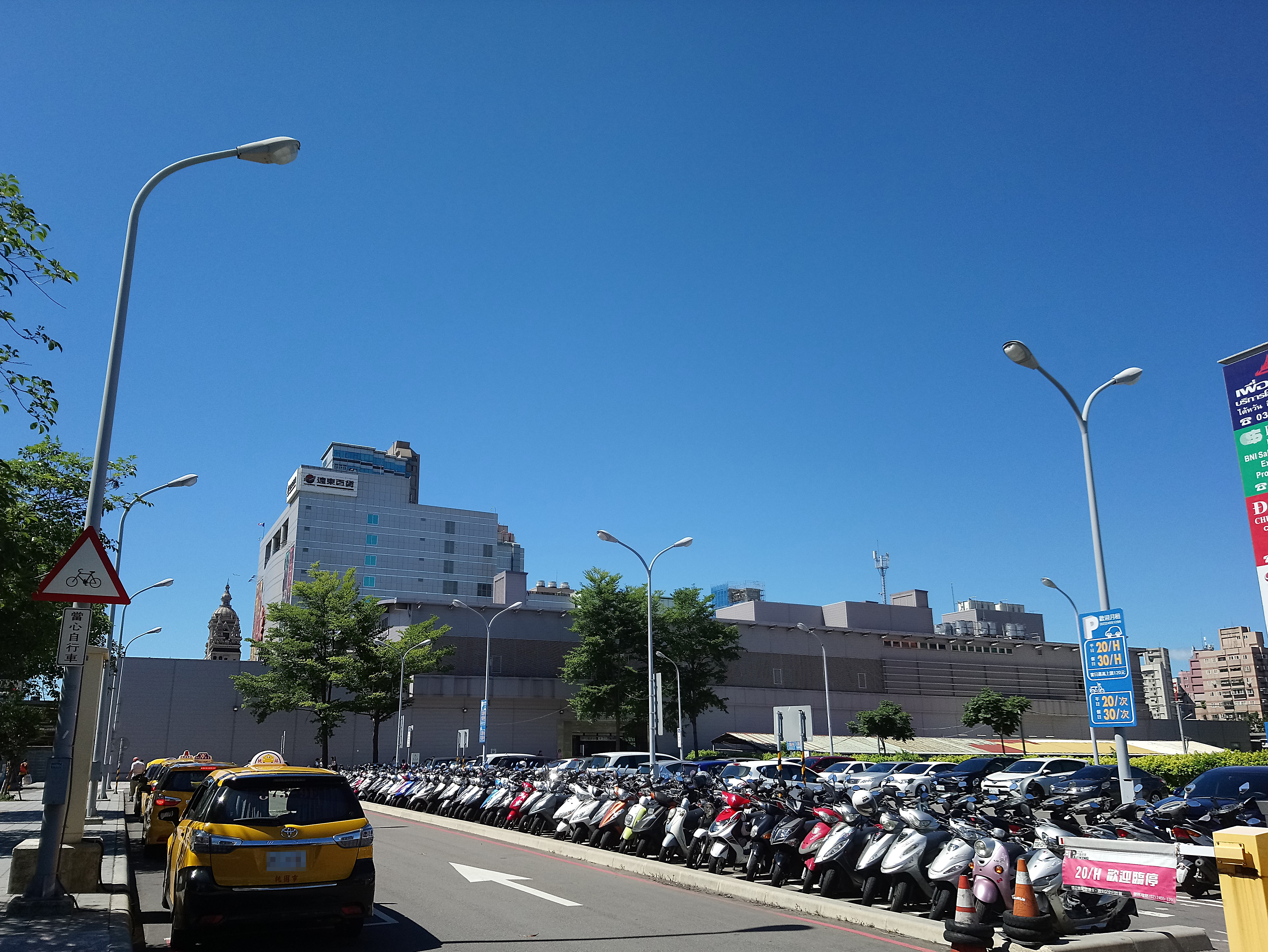 臺鐵桃園臨時車站（後站出口）遠景,桃園市桃園區大樹林次分區建國里